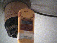 Радиоизотопный дымовой извещатель РИД-1